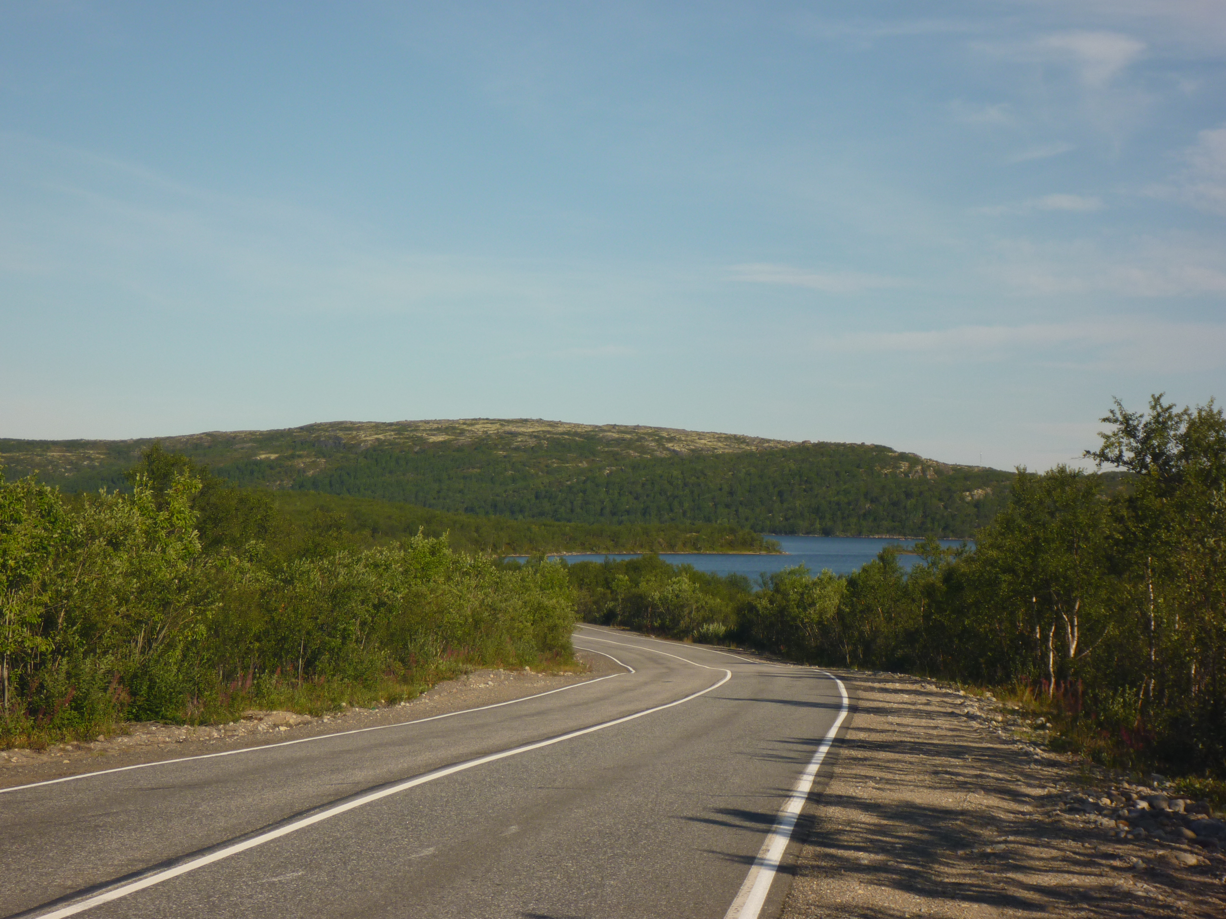 Kolsky District, Murmansk Oblast, Russia